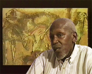 Portrait de Iba N'Diaye